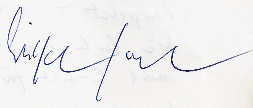 Wilhelm Goerdt. Signatur seines handschriftlichen Briefes an mich vom 16.12.1991